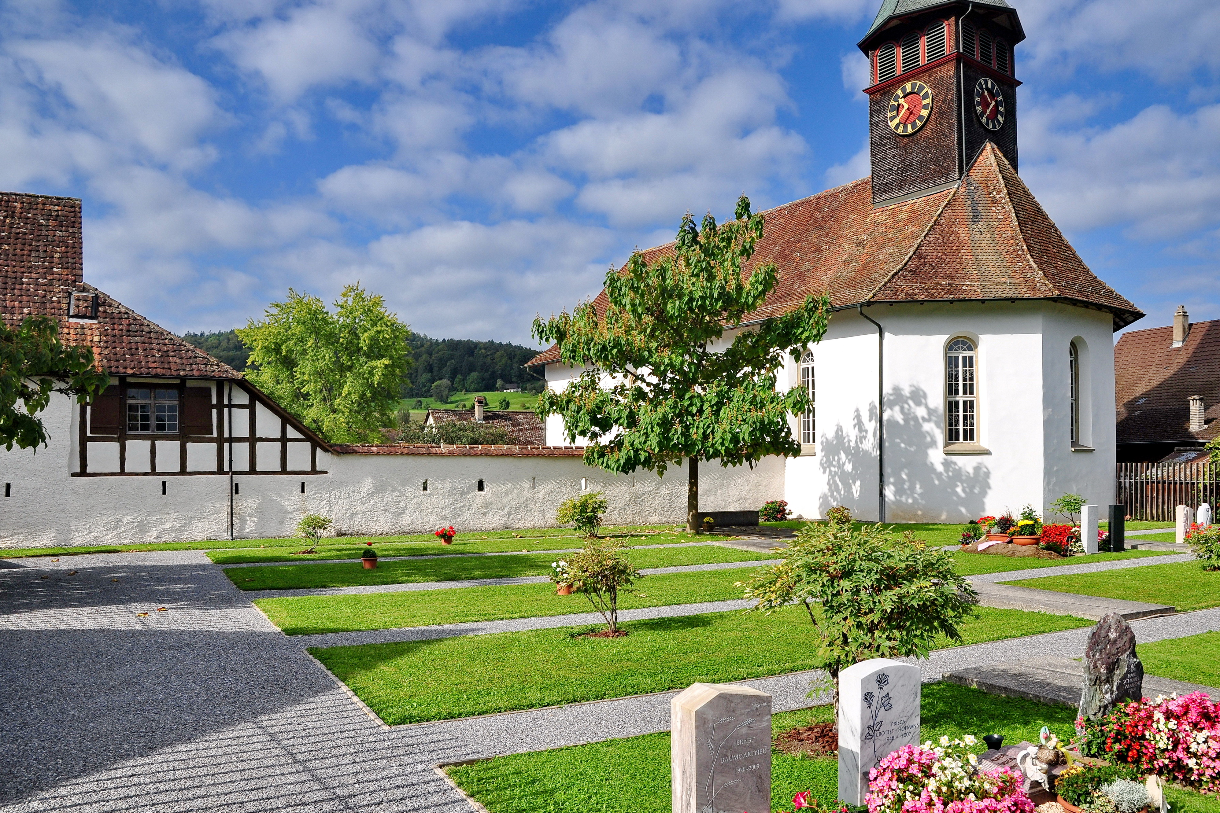 Kirchenbezirk, Büelstrasse 17 in Weiach (Switzerland)